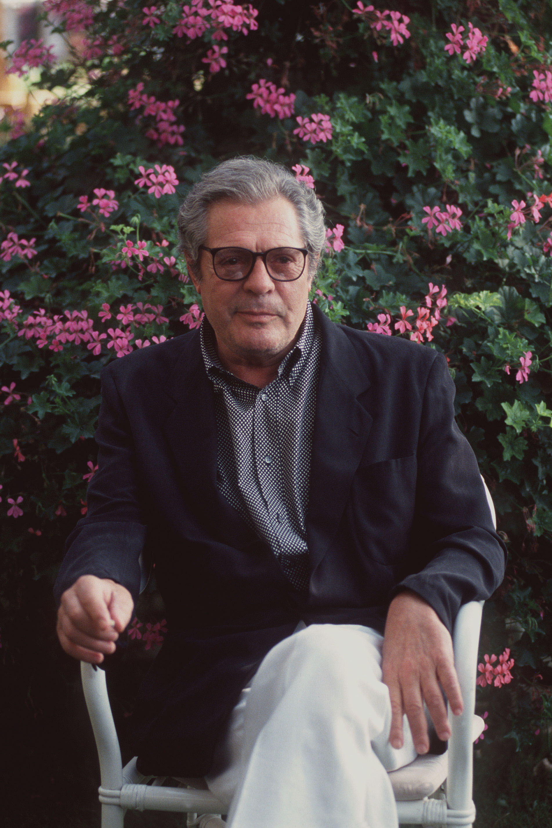 L'attore Marcello Mastroianni alla Mostra del Cinema di Venezia del 1993